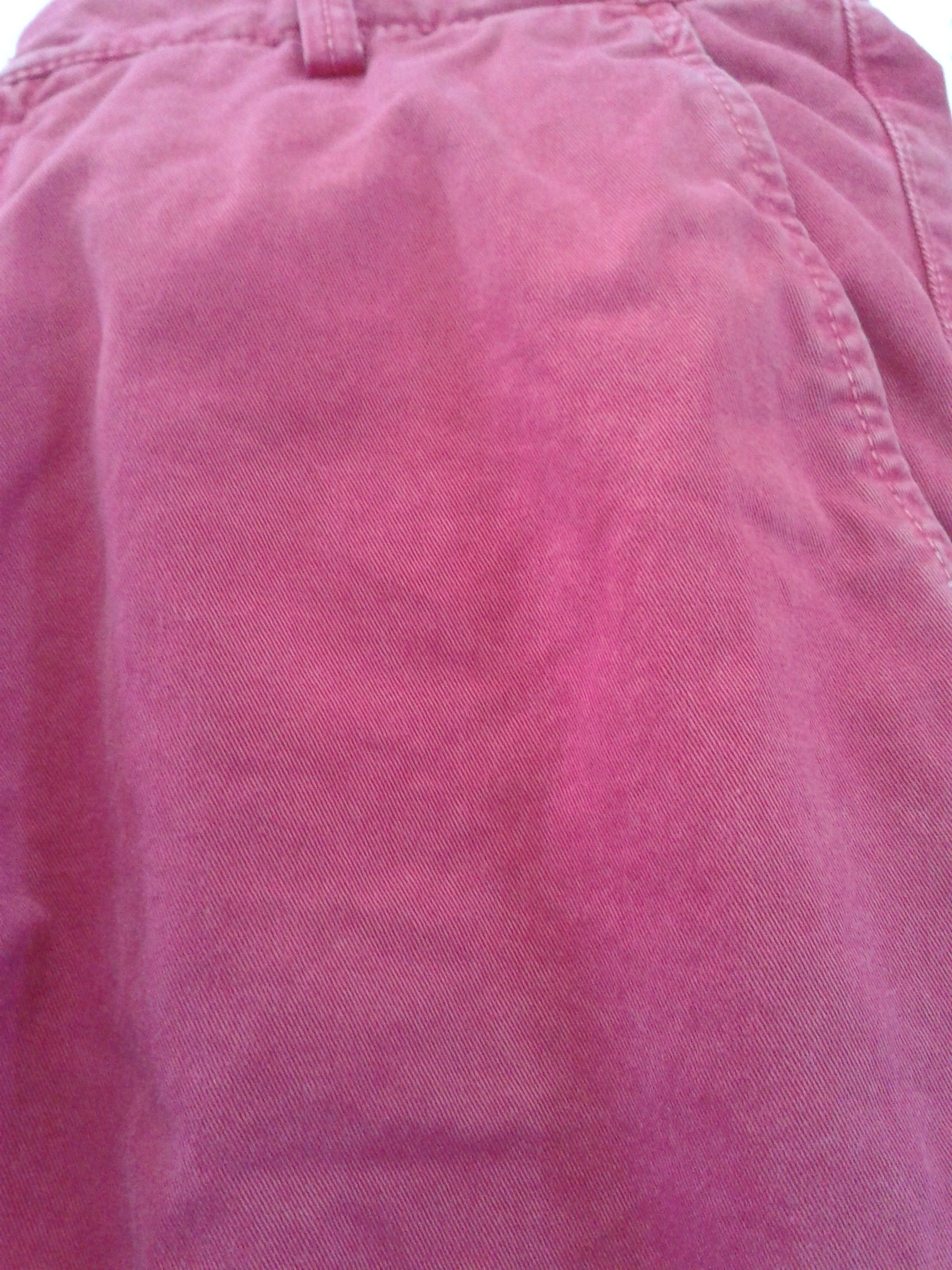 Esempio di un pantalone tinto in capo